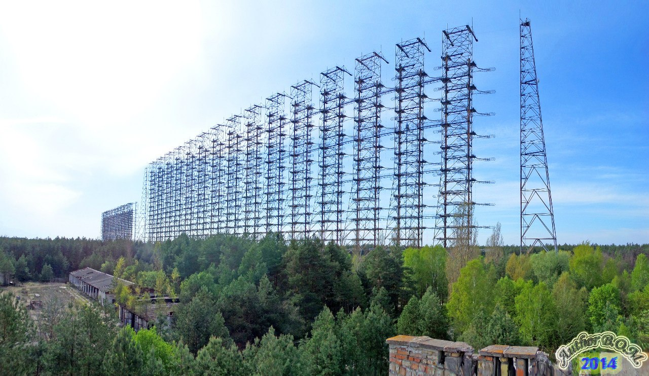 Антени радіолокаційної станції "Дуга", панорама з даху службових приміщень